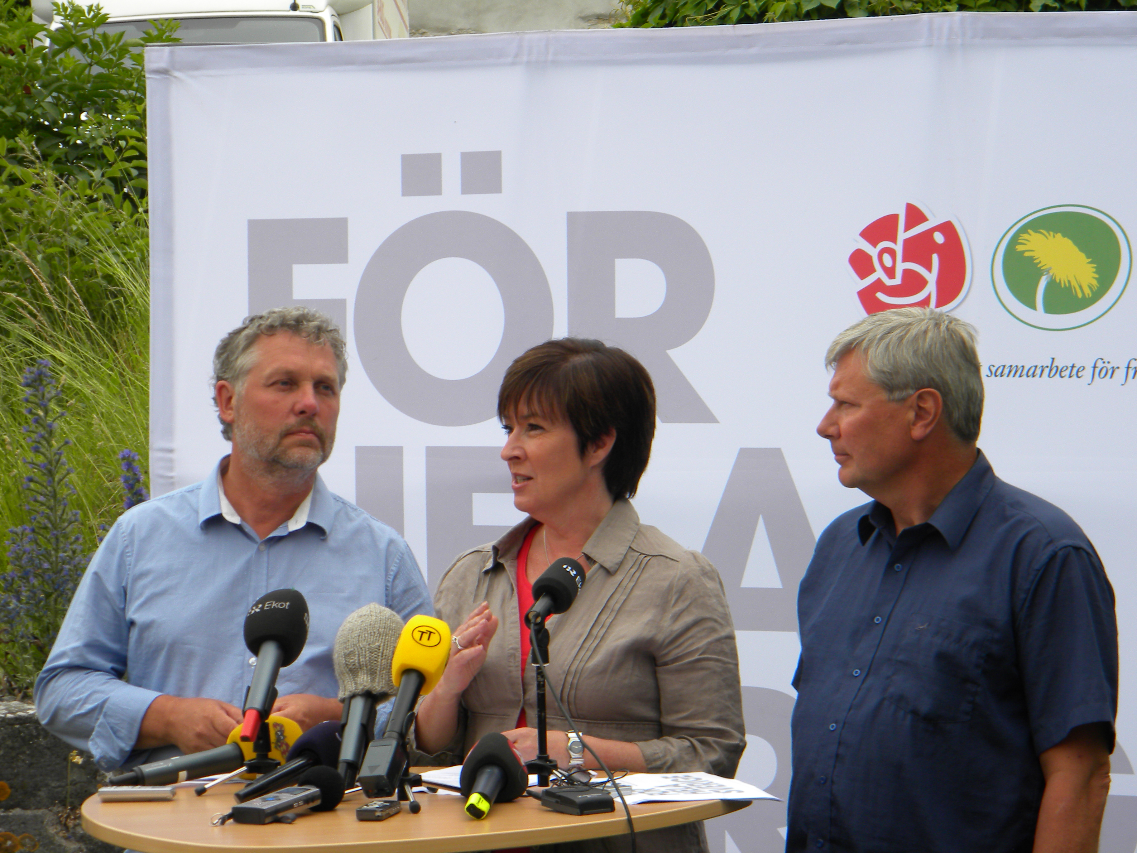 Rödgröna i Almedalen 2010. Peter Eriksson, Mona Sahlin, Lars Ohly